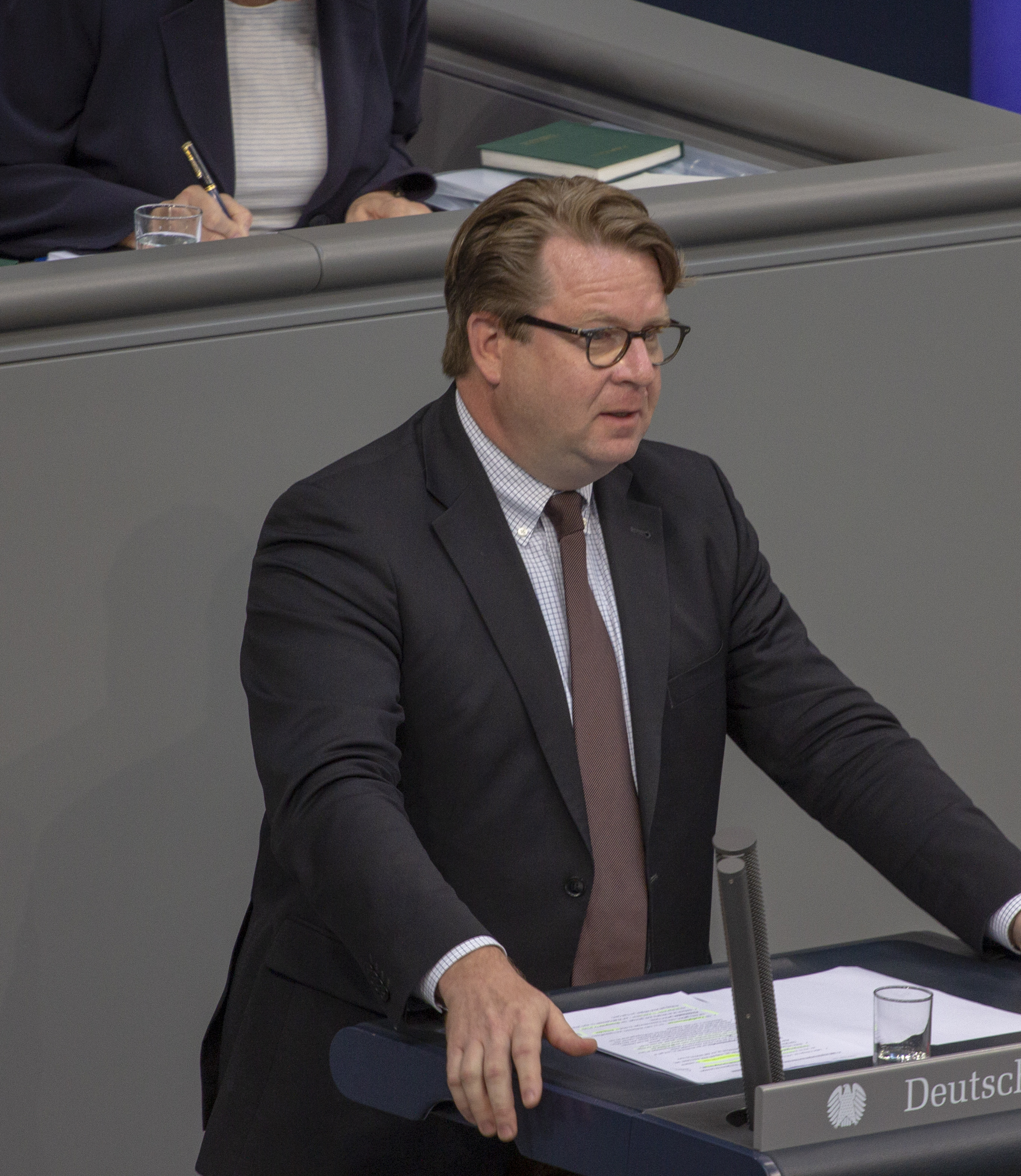 Carsten Müller Mitglied des Deutschen Bundestages während einer Plenarsitzung am 9. Mai 2019 in Berlin.